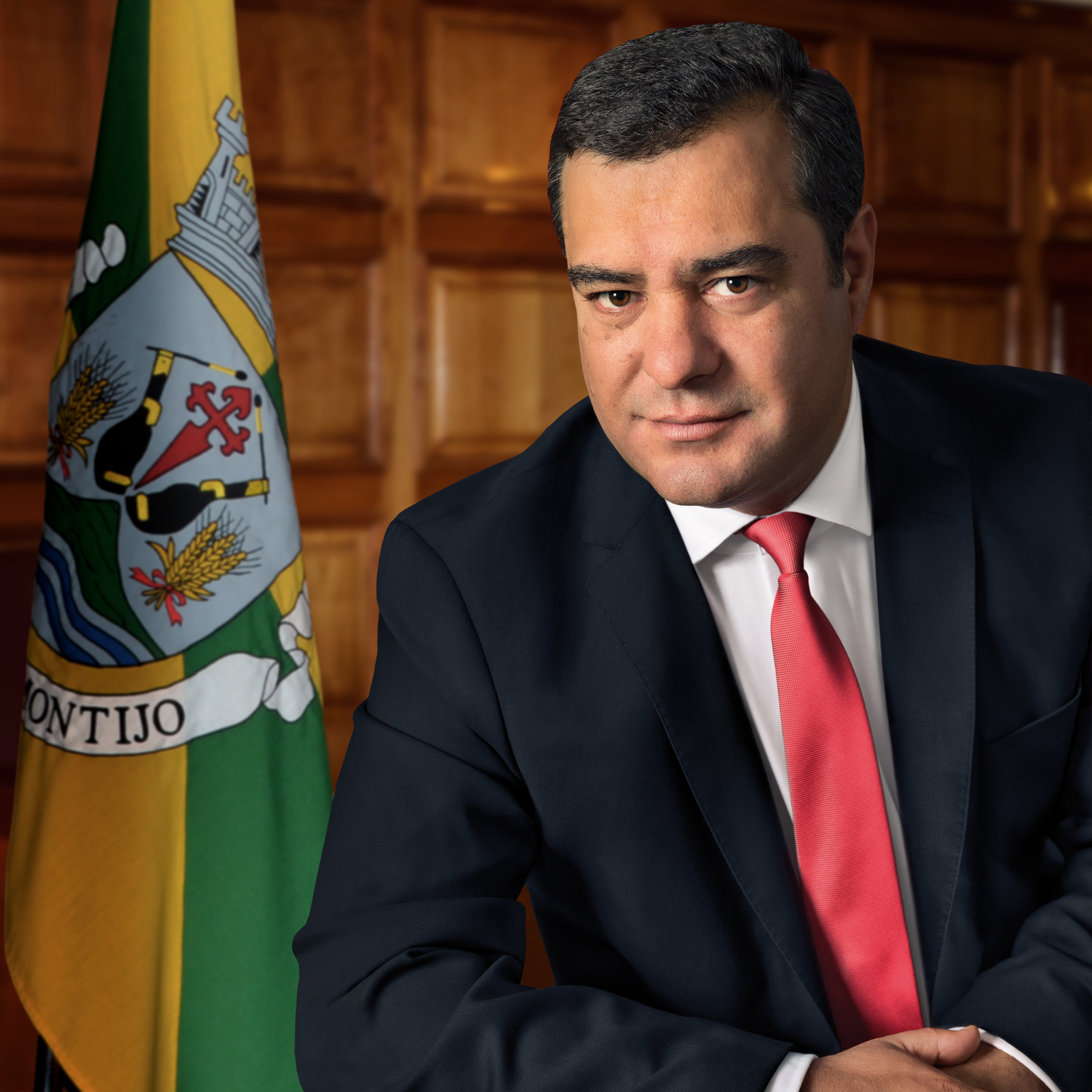 Nuno Ribeiro Canta, Presidente da Câmara Municipal do Montijo desde 2013